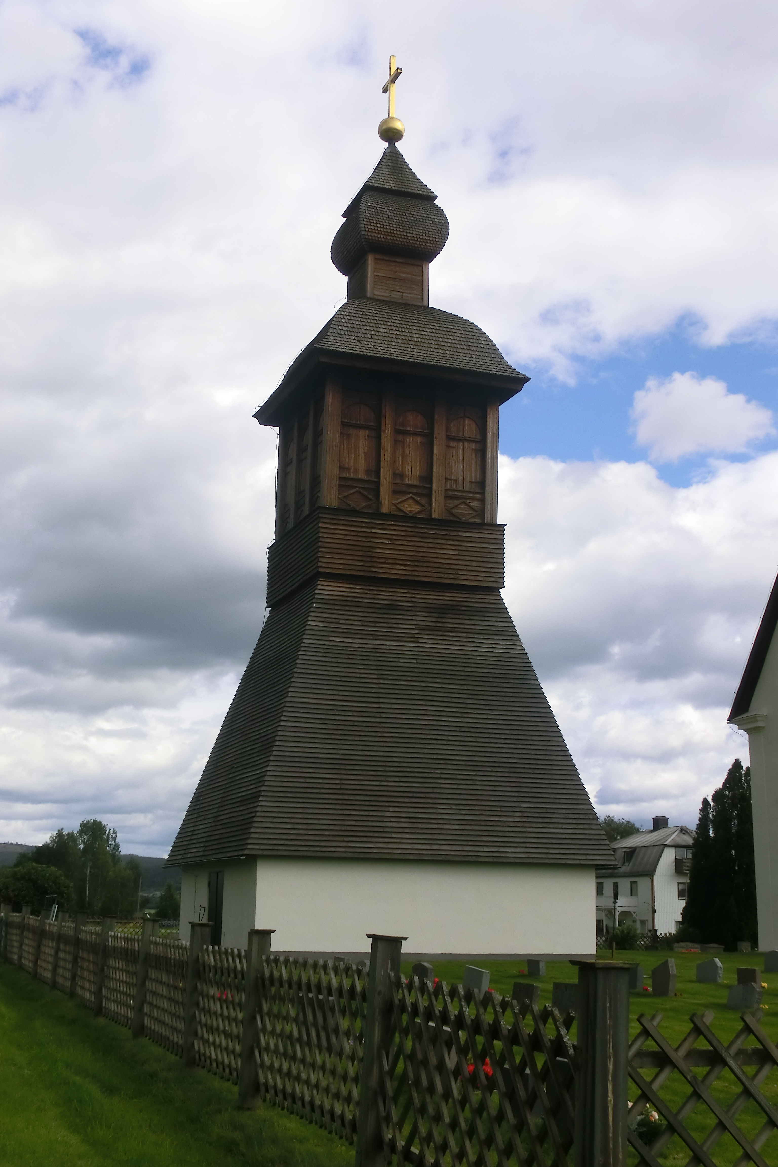 Torsåkers kyrka, Härnösands stift